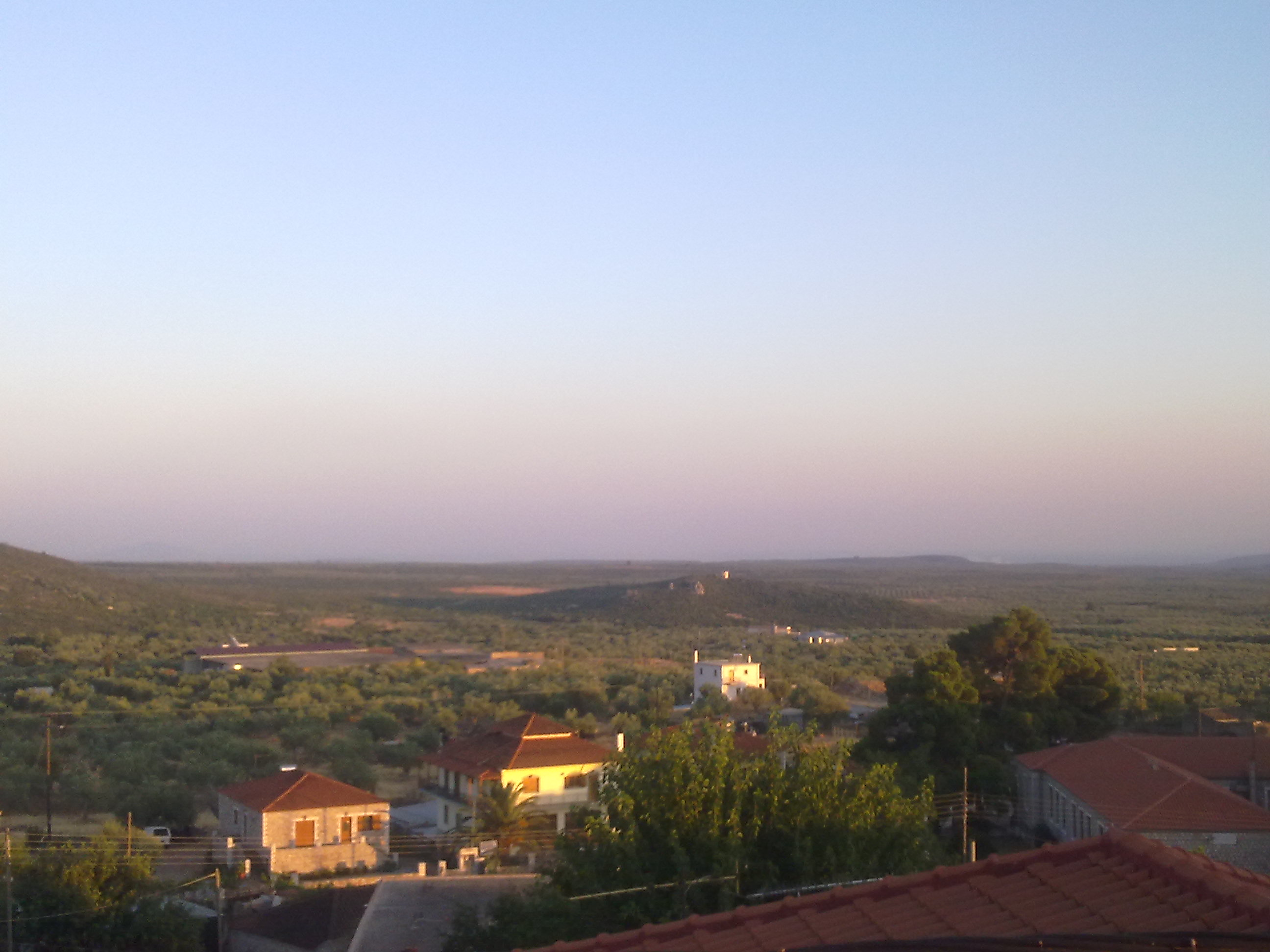 Η θέα από το χωριό - Ο κάμπος